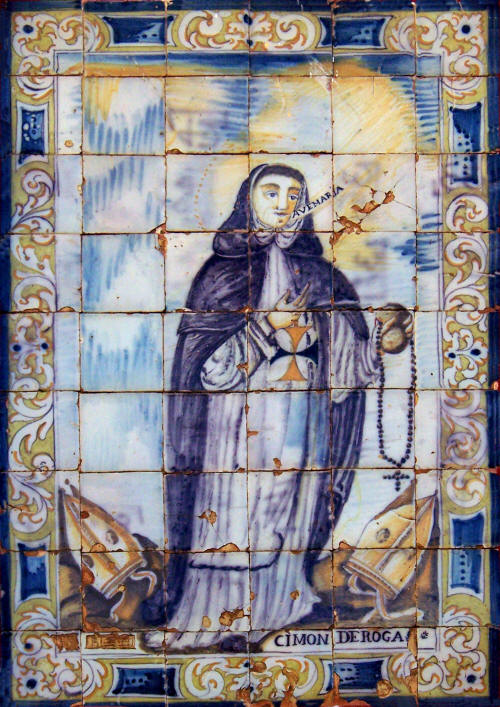 Retablo cerámico anónimo, del s. XVII, en la fachada de la iglesia de María Auxiliadora de Sevilla